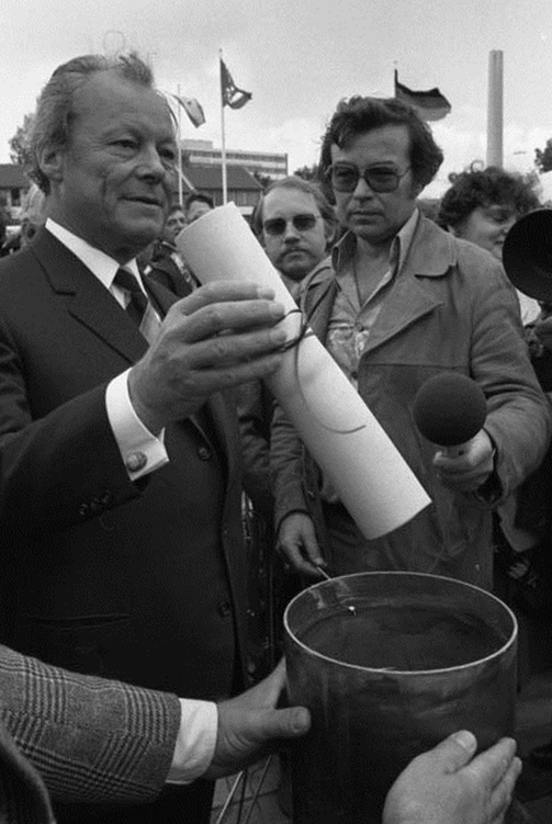 SPD-Bundesvorsitzender Willy Brandt legt Grundstein für die neue Bundeszentrale der SPD in der Erich-Ollenhauer-Straße, Bonn